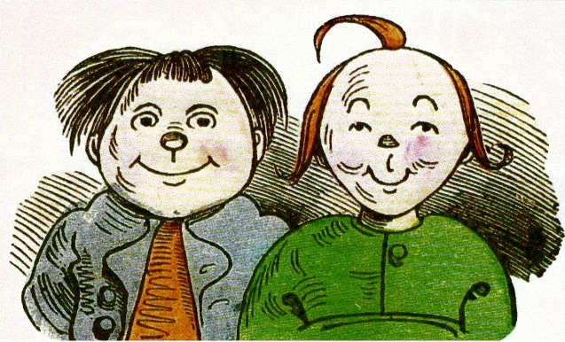 Zeichnung von Wilhelm Busch (1832-1908), Titelbild zu seiner gleichnamigen Erzählung.